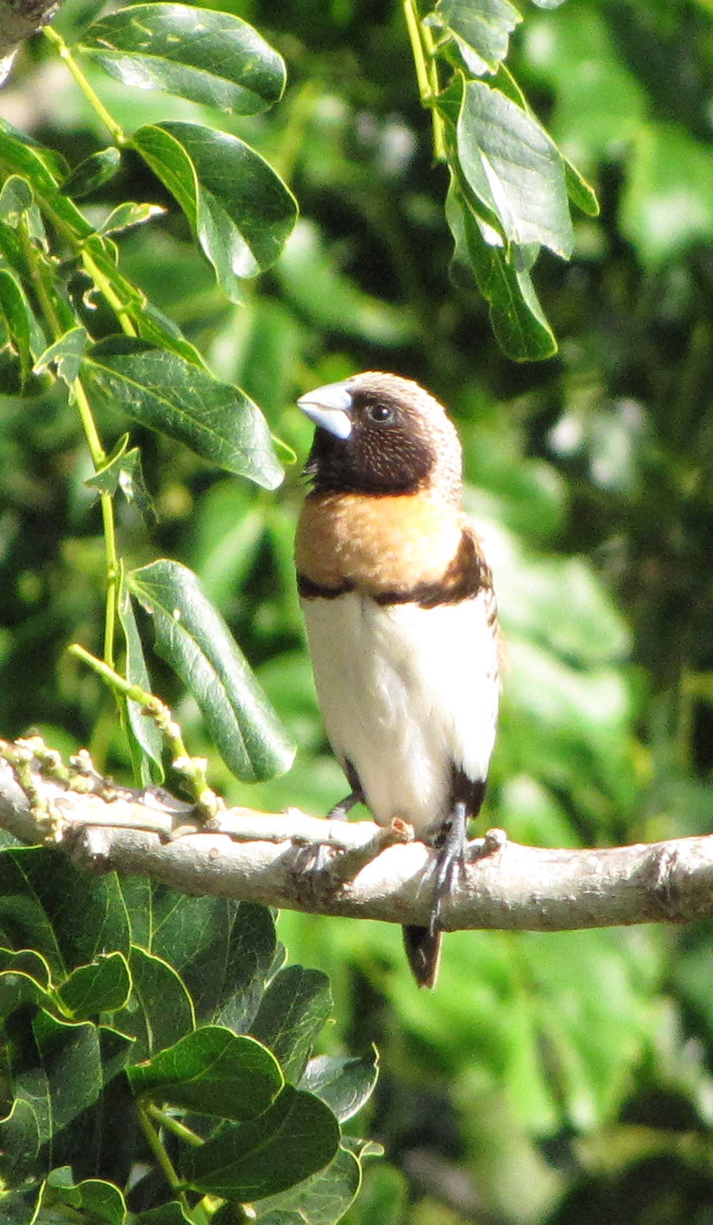 Reo tahiti: Vini[check]